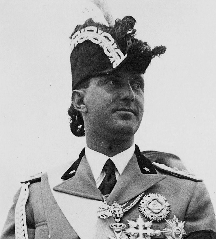 Umberto II, King of Italy (9 May 1946 – 12 June 1946). Photo 1923